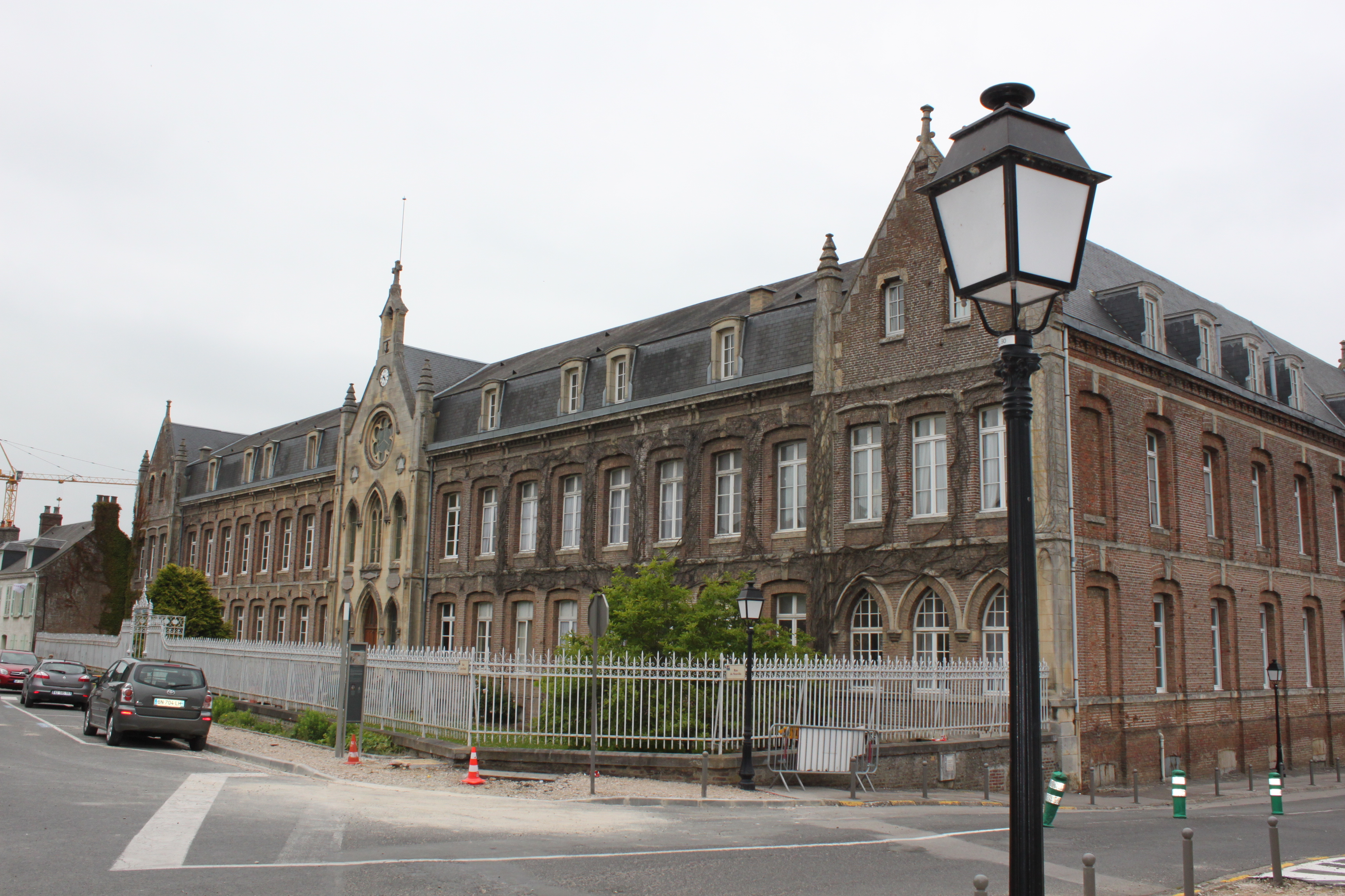 Saint-Valery-sur-Somme, Somme, France